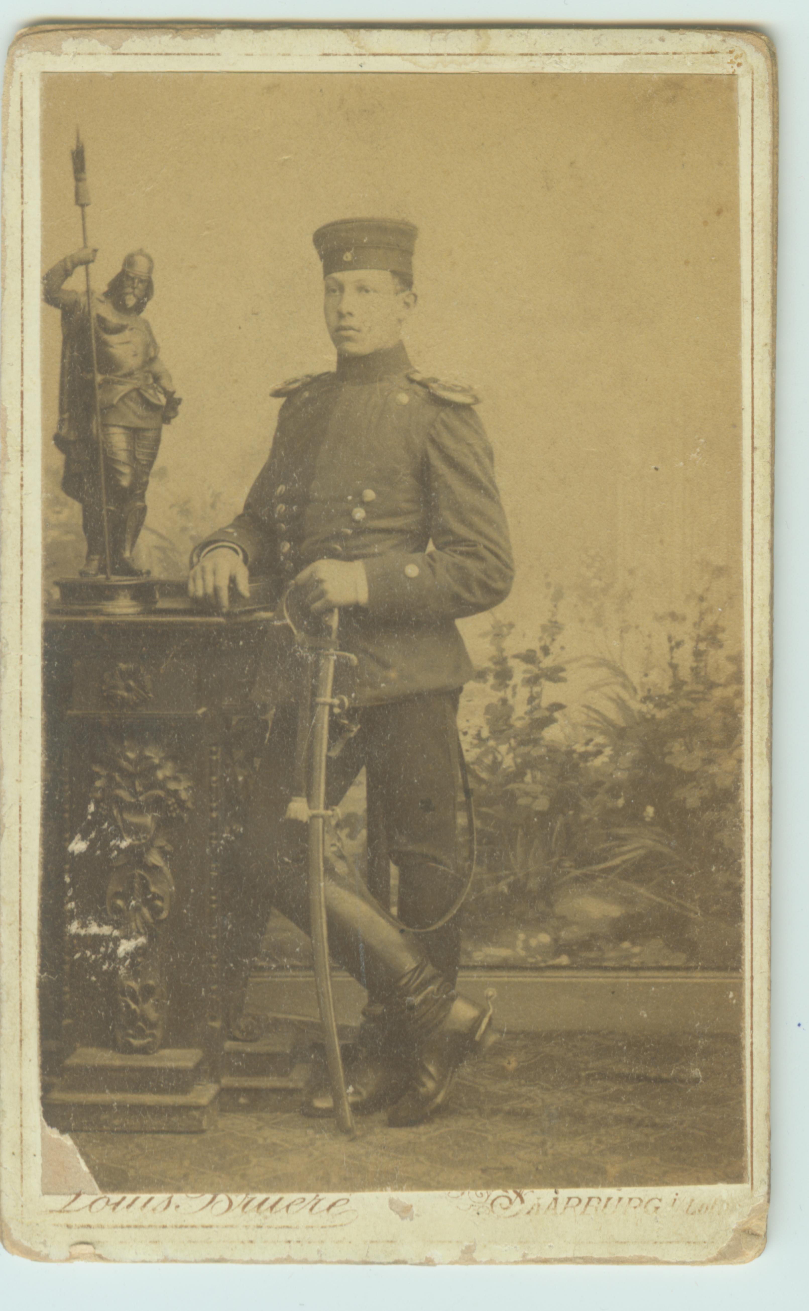 גוסטב ארמן, חייל בצבא הקייזר הגרמני, 1890, סאארברוקן, גרמניה